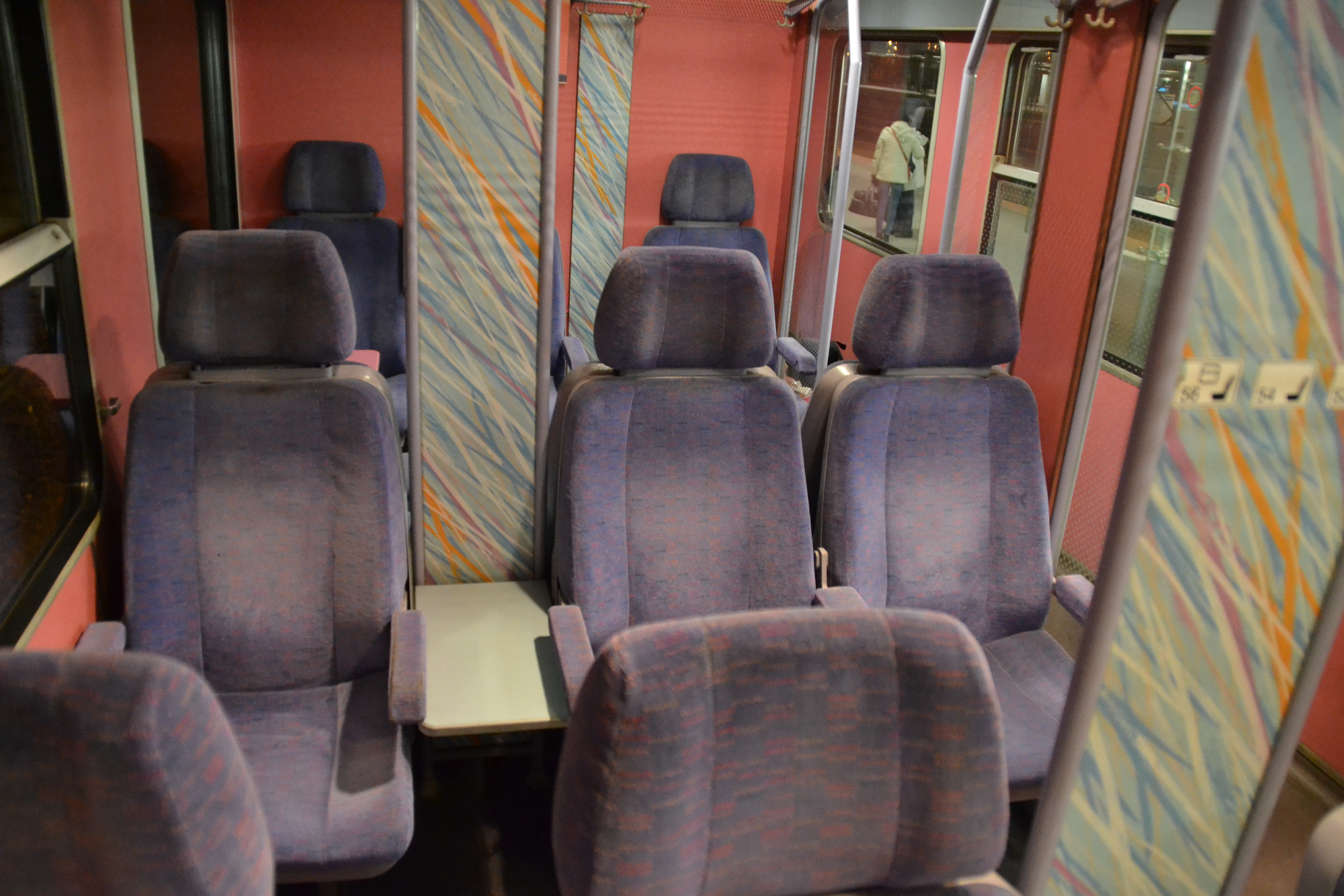 1. osztályú Halberstadti kocsi belseje